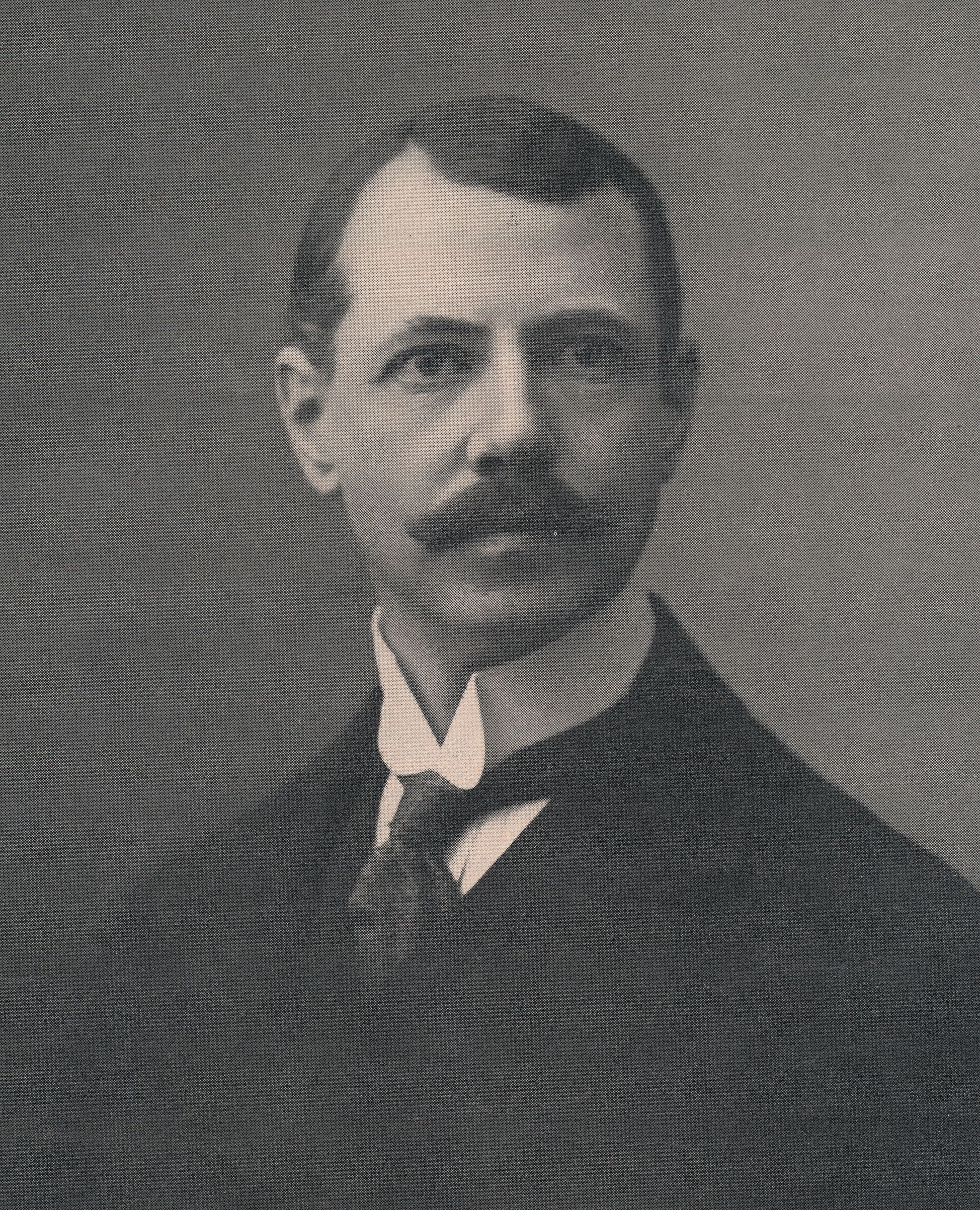 Mr. J. D. van Ketwich Verschuur, ten tijde van zijn benoeming tot Consul-Generaal voor Zuid-Afrika